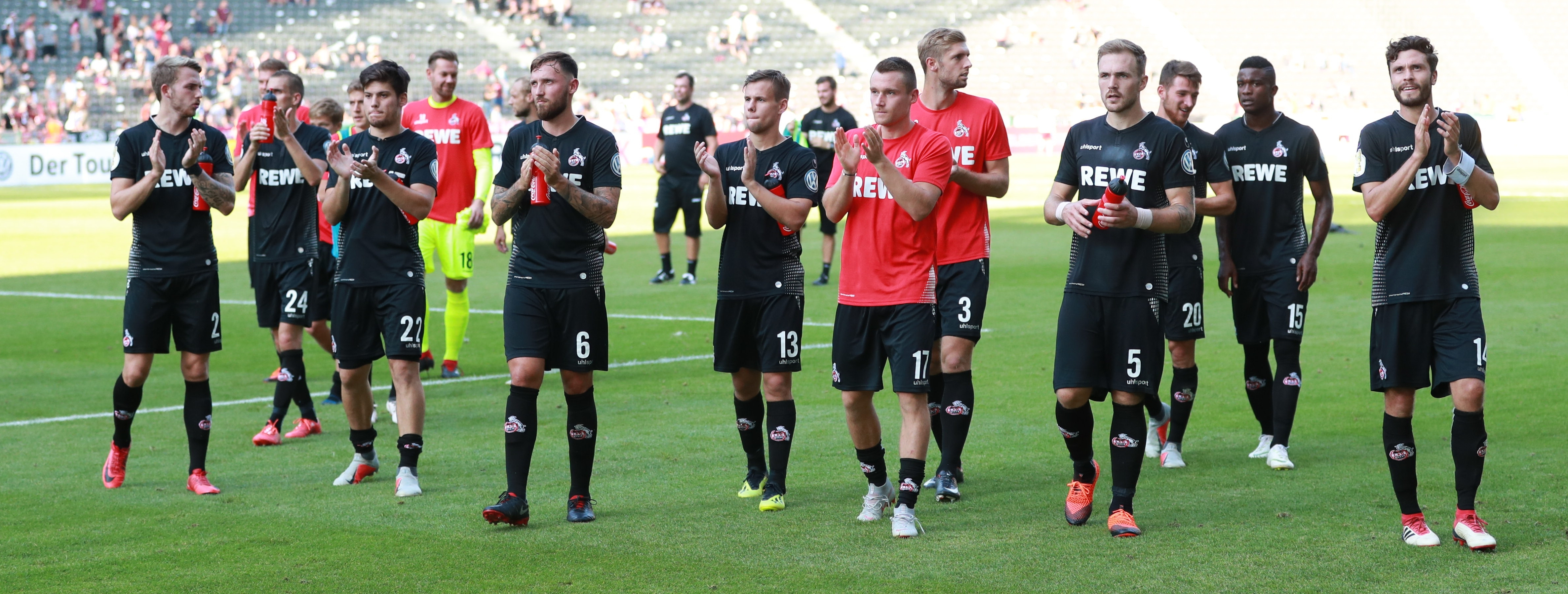 DFB-Pokal 2018/19, 1. Hauptrunde: BFC Dynamo gegen 1. FC Köln 1:9 (1:4)